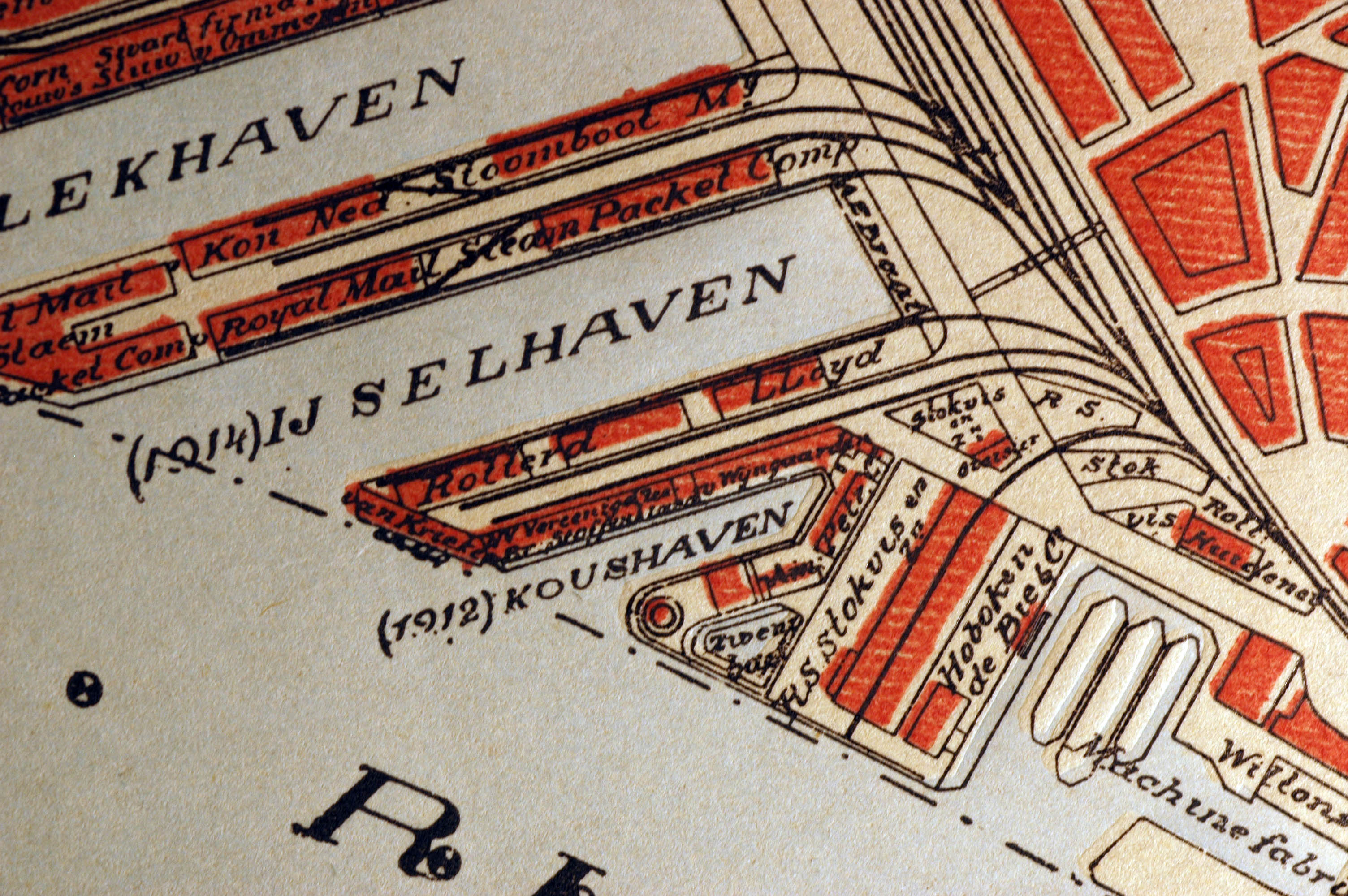 Zwembad De Kous bij de Koushaven in Rotterdam